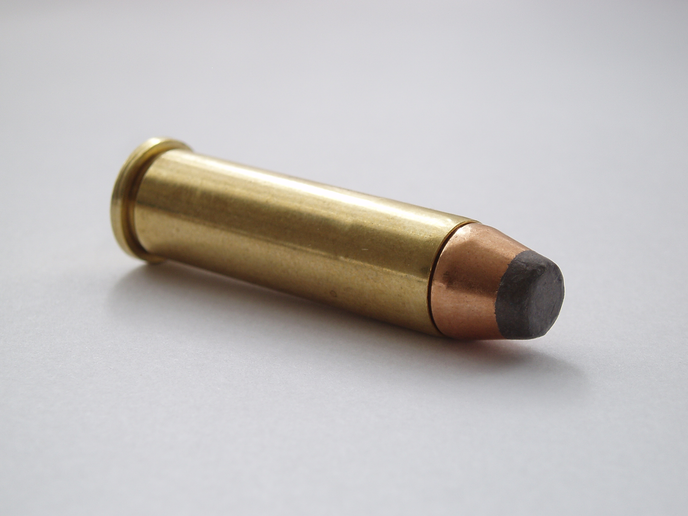 .357 revolver cartrdige. SP bullet. Manufacturer: Sellier & Bellot.